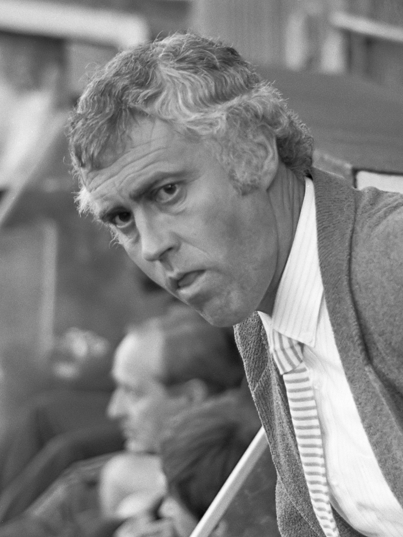 Telstar tegen Excelsior (nacompetitie); Hans Dorjee , trainer Excelsior.